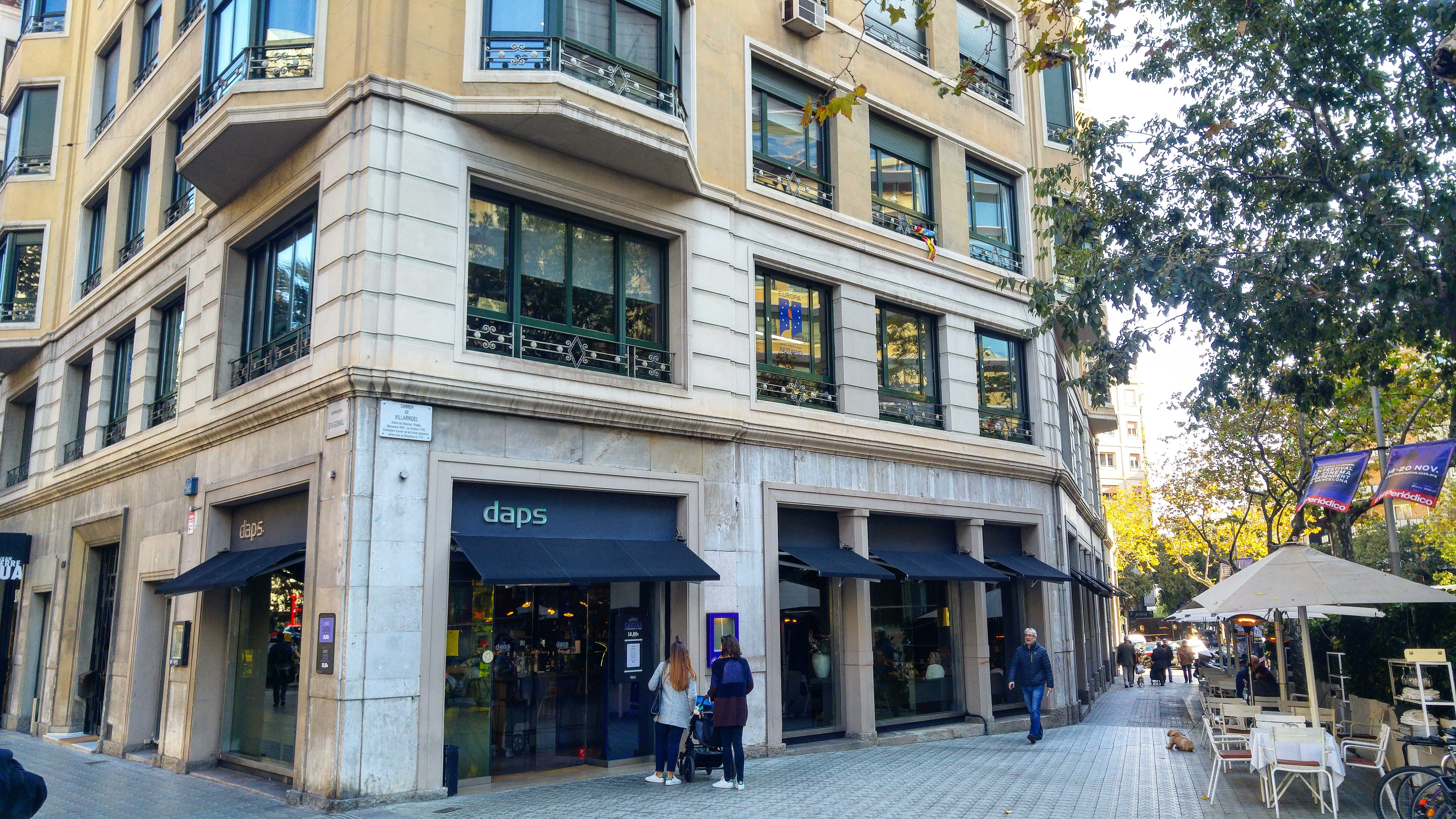 Local de l'antic restaurant Finisterre (1943-1994) de Barcelona, ubicat a la avinguda Diagonal 469, cantonada carrer Villarroel